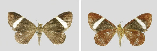 Hagnagora jamaicensis